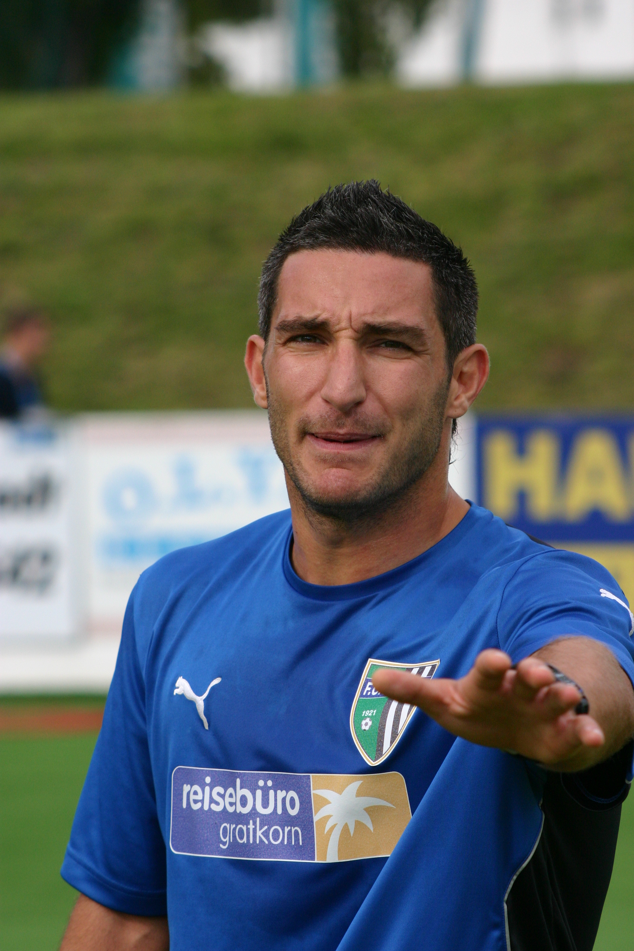 Georges Panagiotopoulos, Spieler des FC Gratkorn, Nationalität Belgien